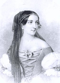 Izabela Jagiellonka